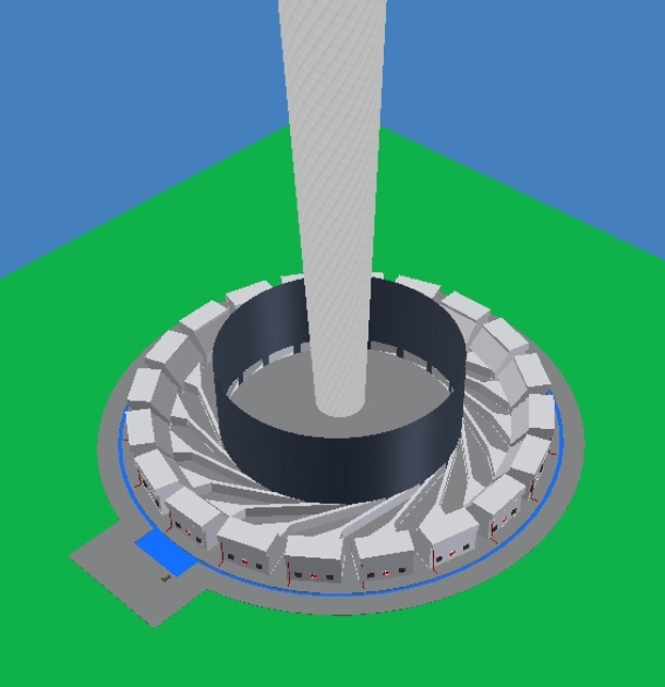 Conceptual vortex engine